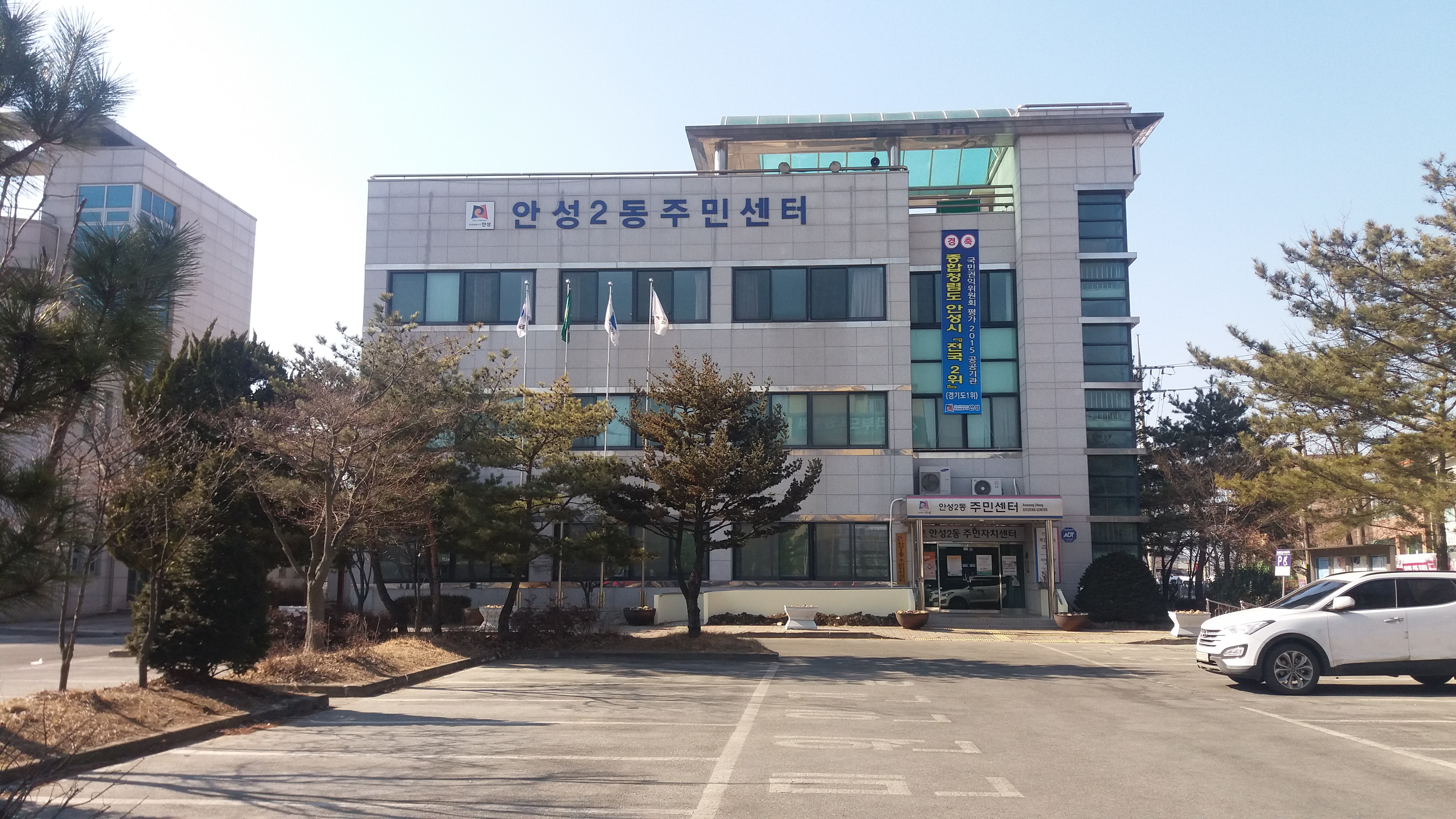 안성2동사무소